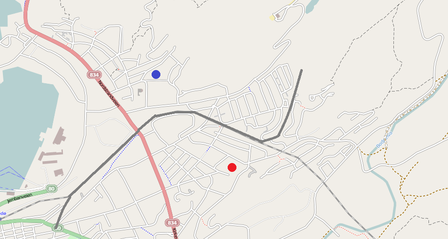 Dette er et kart over Rønvika, der skolene er markert med rød og blå prikk. Den gråe streken er det tradisjonelle skillet mellom skolekretsene. Kartet er hentet fra